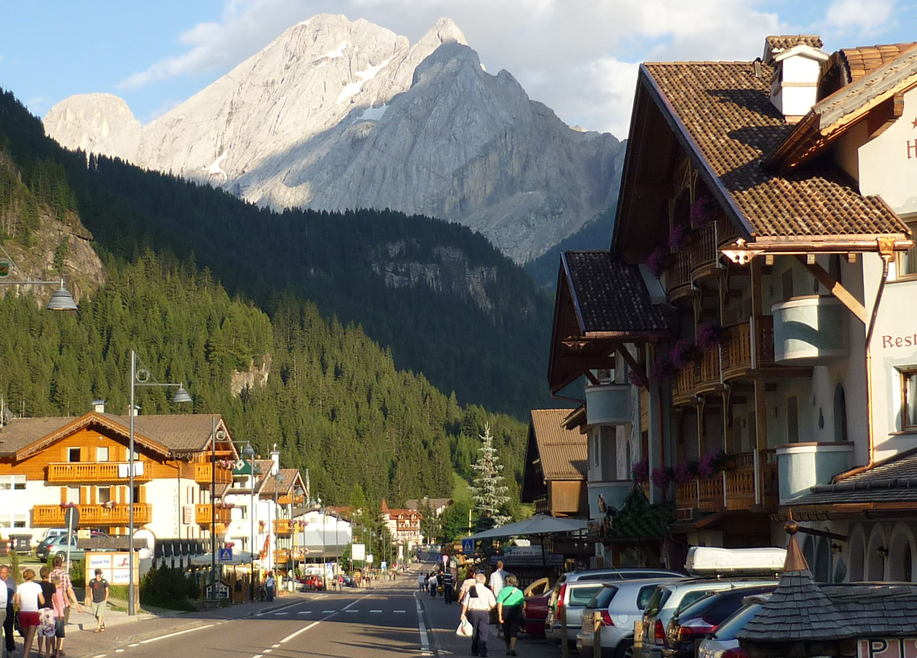 Hauptstraße in Canazei/Trentino